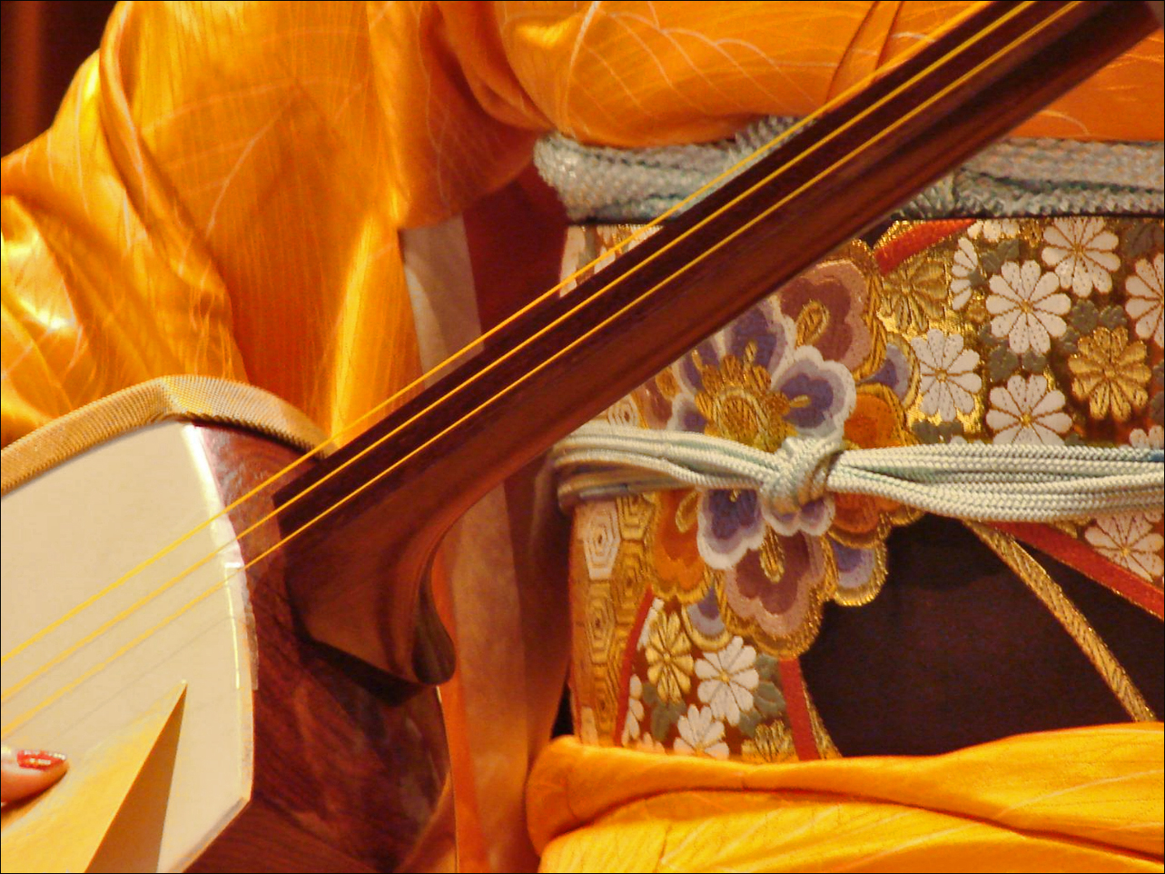 Camkytiwa Avec Huong Thanh (Vietnam) : voix - Yan Li (Chine) : erhu - Fumie Hihara (Japon) : shamisen, koto - E’Joung-ju (Corée) : gômoungo Concert dans l'auditorium du musée Guimet Vendredi 19 novembre 2010